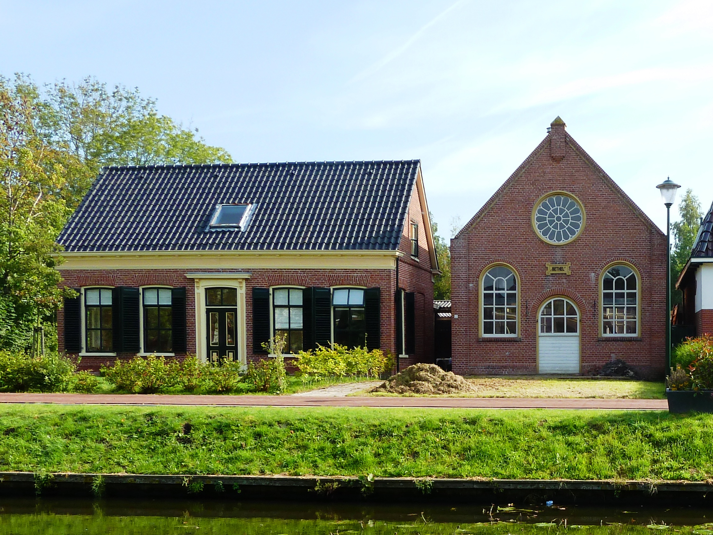 Rechts de hervormde evangelisatie "Bethel" in Grijpskerk. Ook wel 'Lodderkerkje' genoemd naar de eerste predikant W.C. Lodder. Links de pastorie.